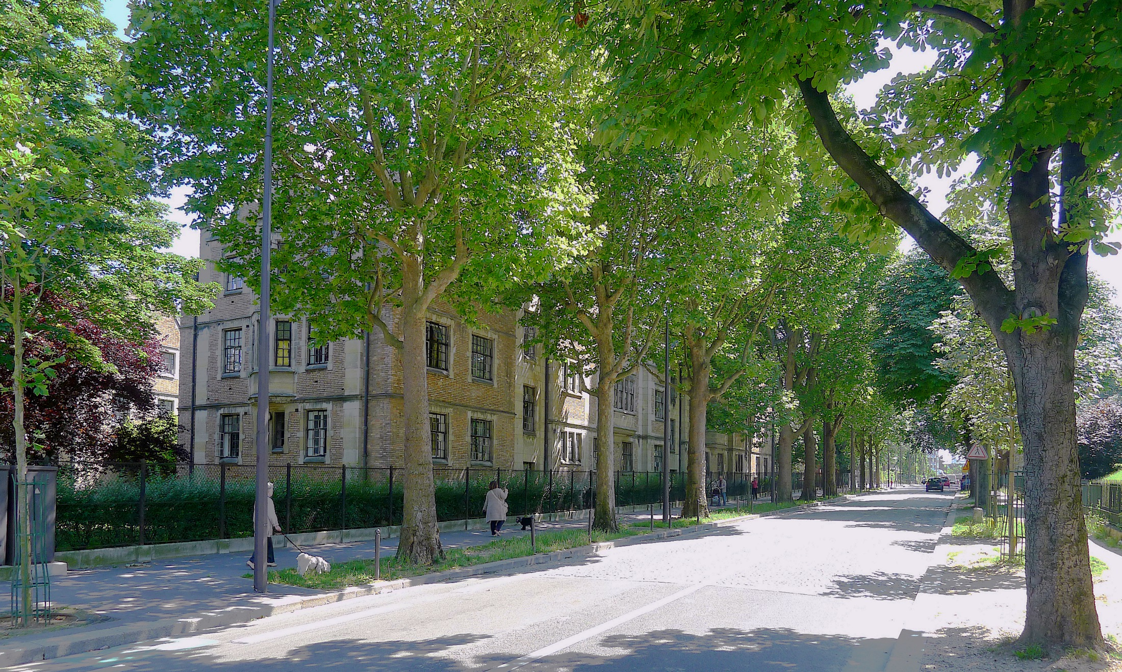 Avenue David-Weill (voie orientale) - Paris XIV